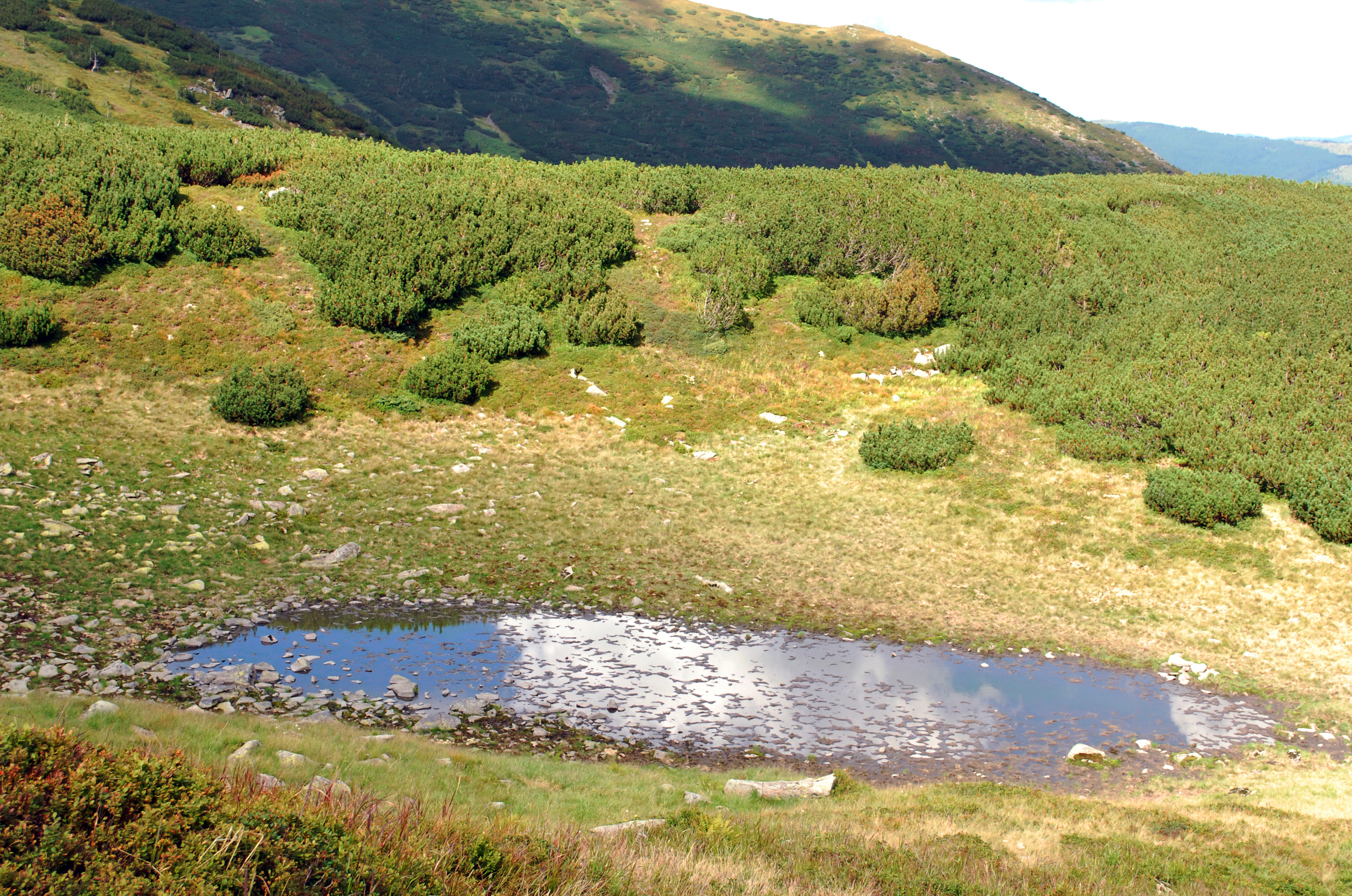 Озерце Чугайстрів - вид з півдня 2016